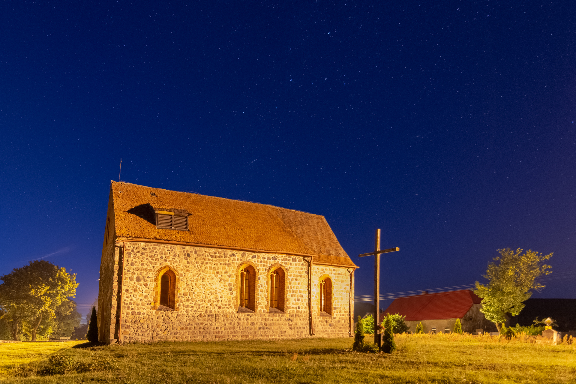 Nocne ujęcie kościoła pw. Najświętszego Serca Jezusa